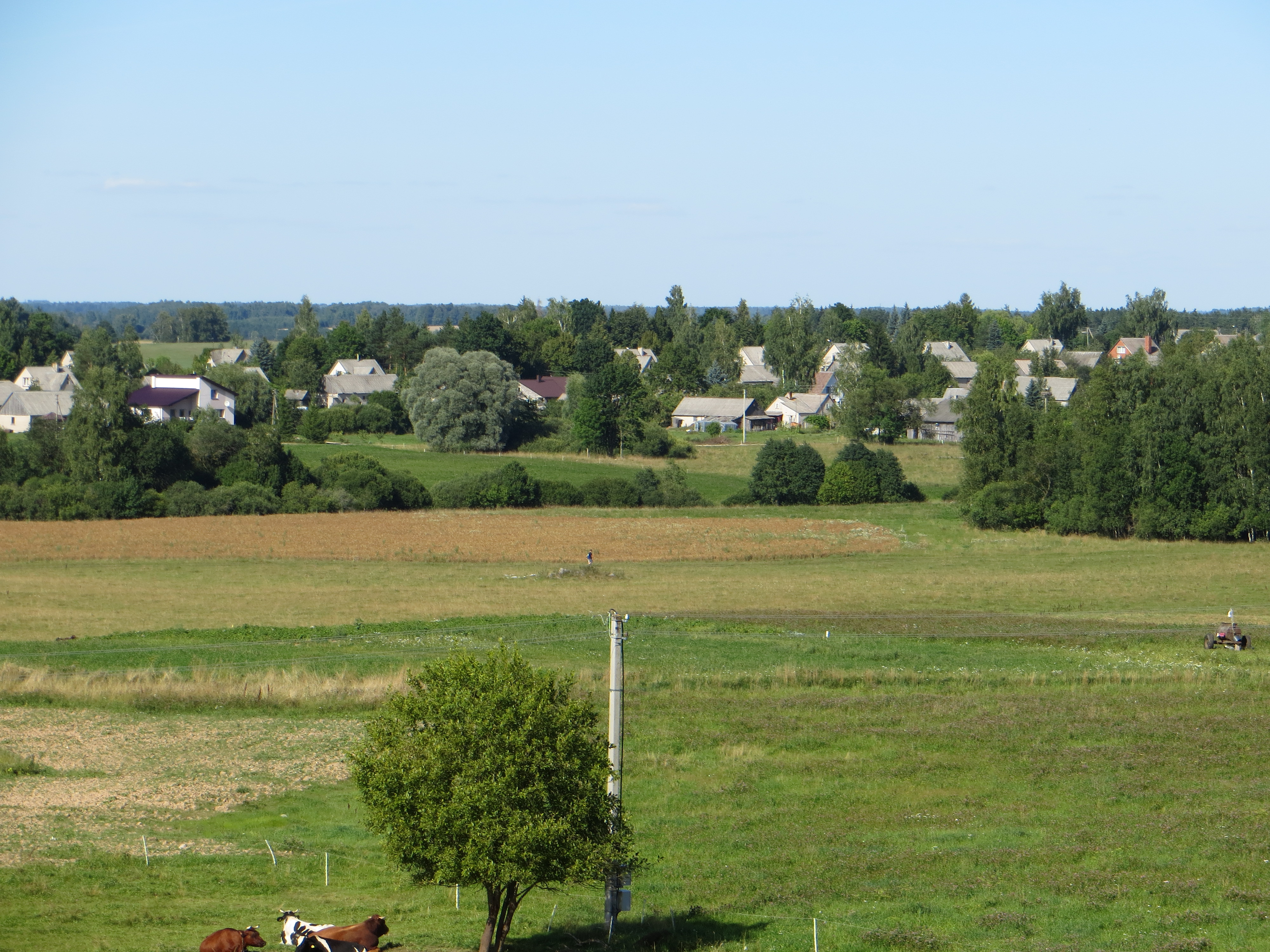 Svėdasų sen., Lithuania